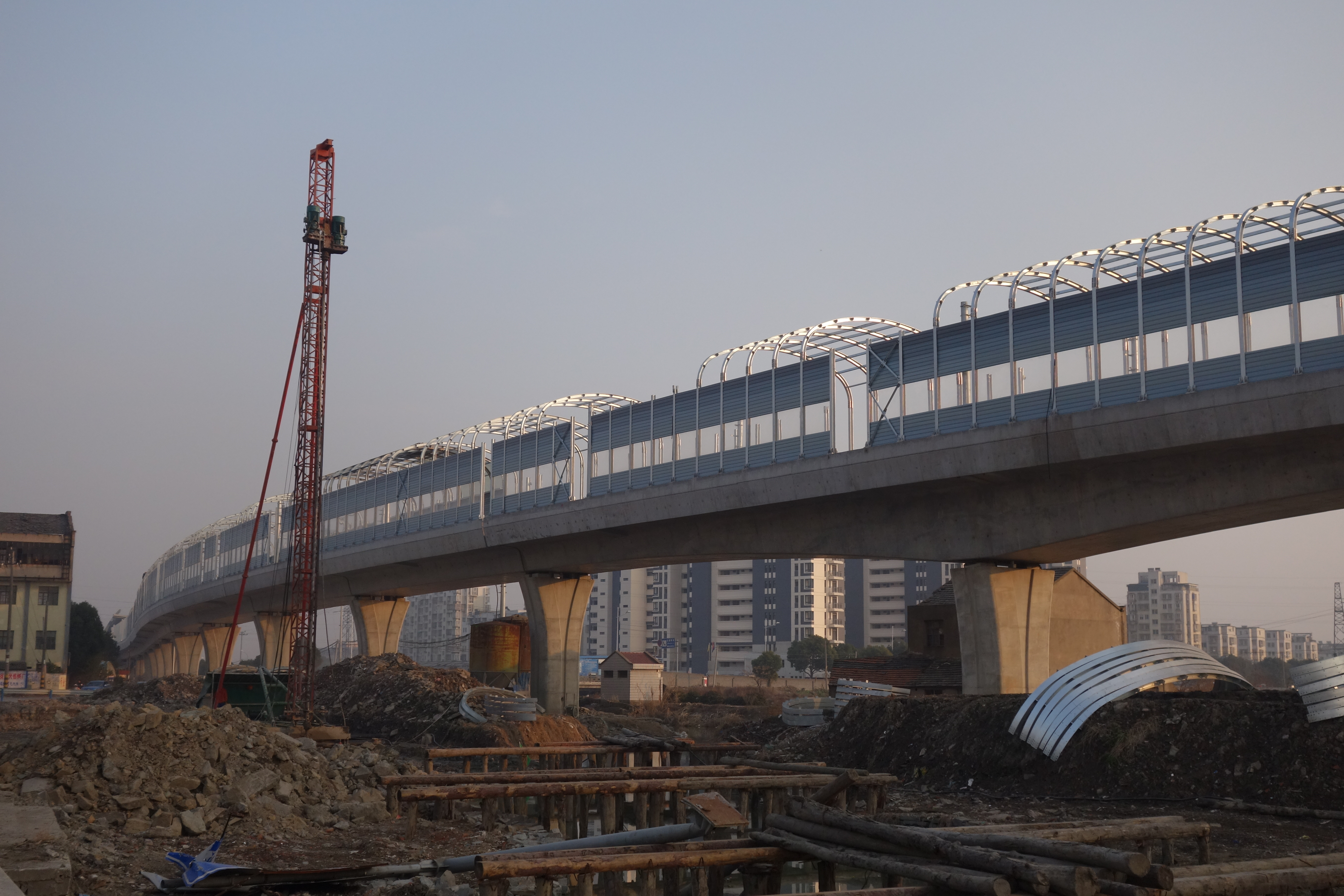 建设中的1号线芦港-徐家漕区间高架桥